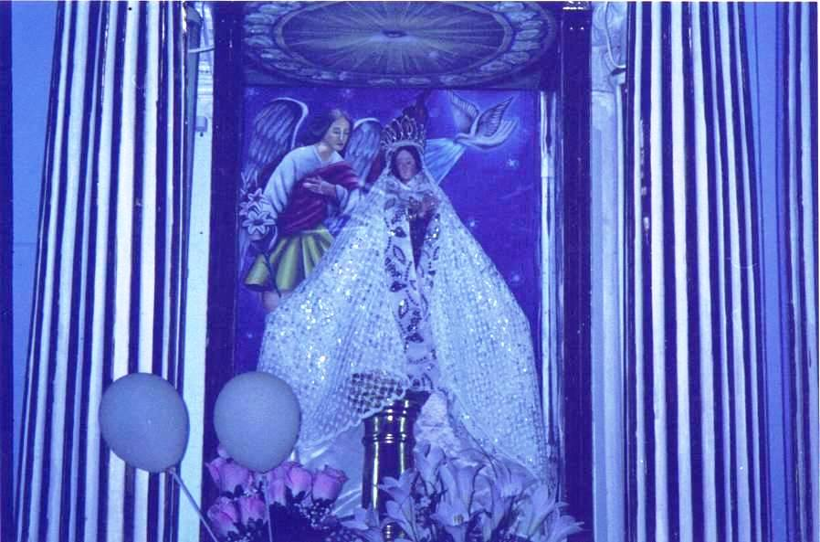 Nuestra Señora de la Defensa, Panotla, Tlaxcala, México.